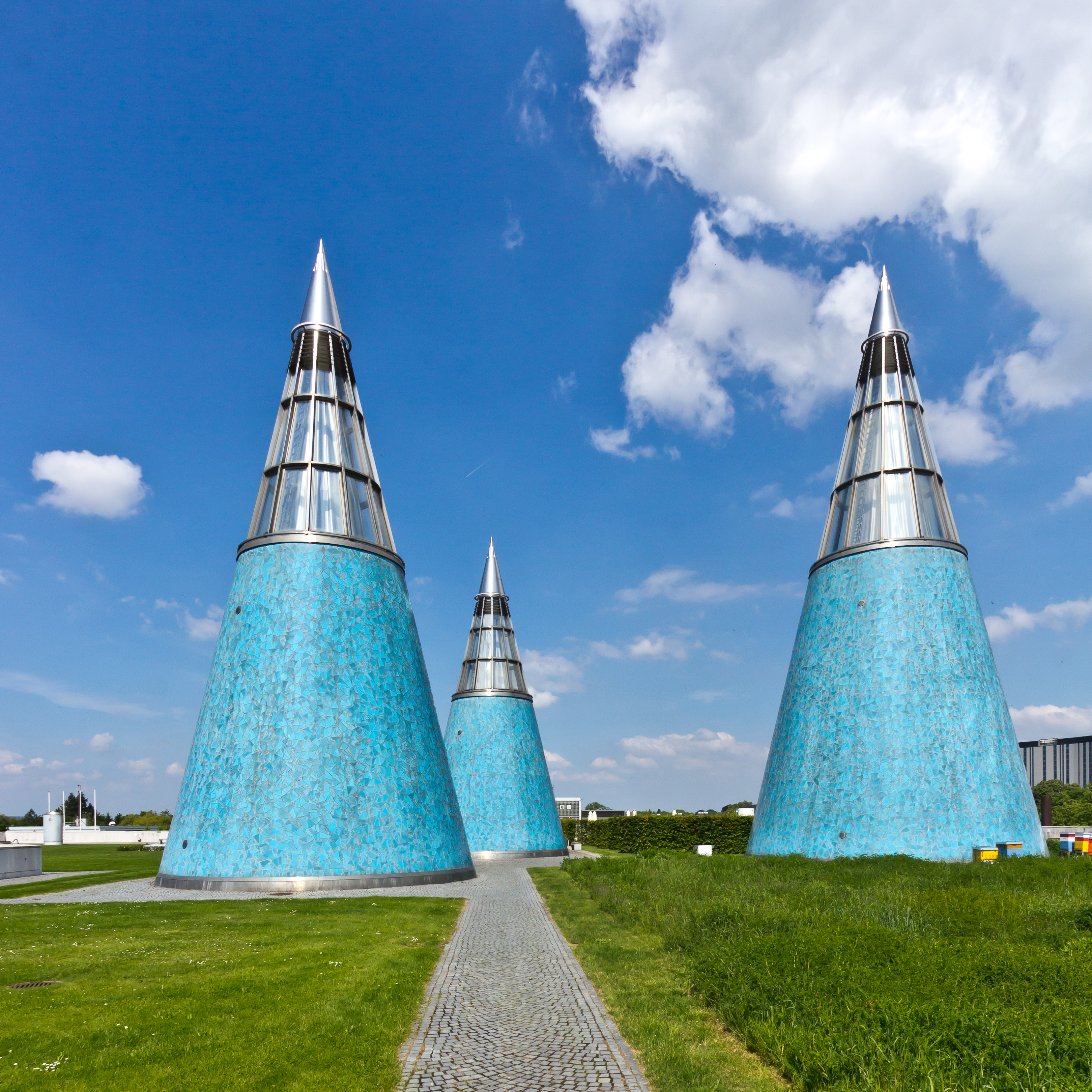 Kunst- und Ausstellungshalle der Bundesrepublik Deutschland - Bundeskunsthalle